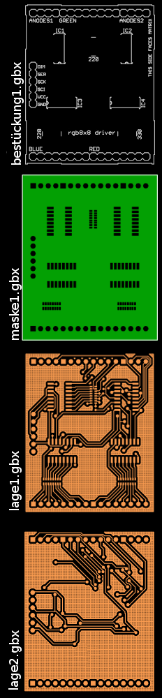 Verschiedene Lagentypen fuer die Leiterplattenherstellung